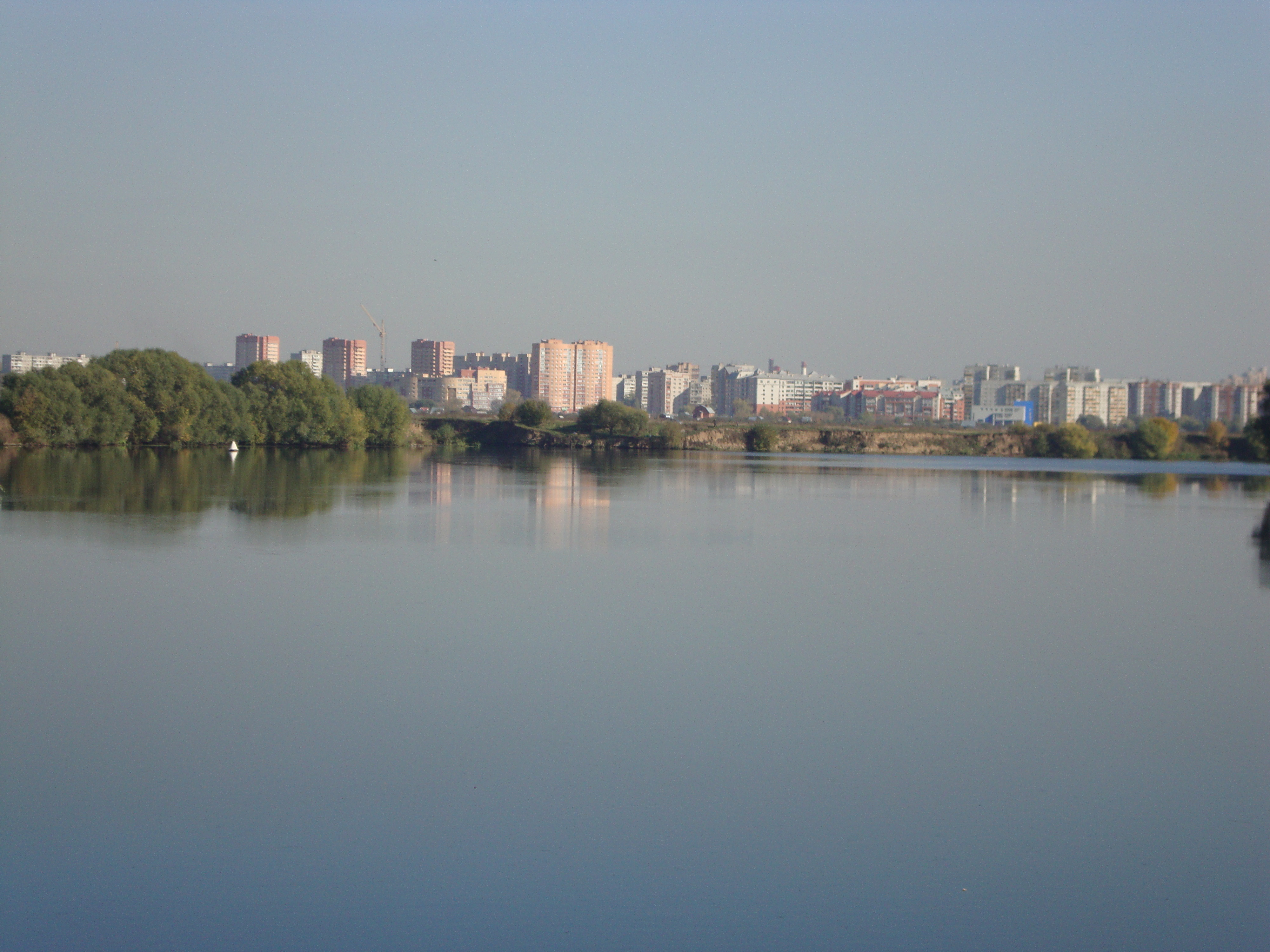 Место слияния Пехорки и Москвы-реки